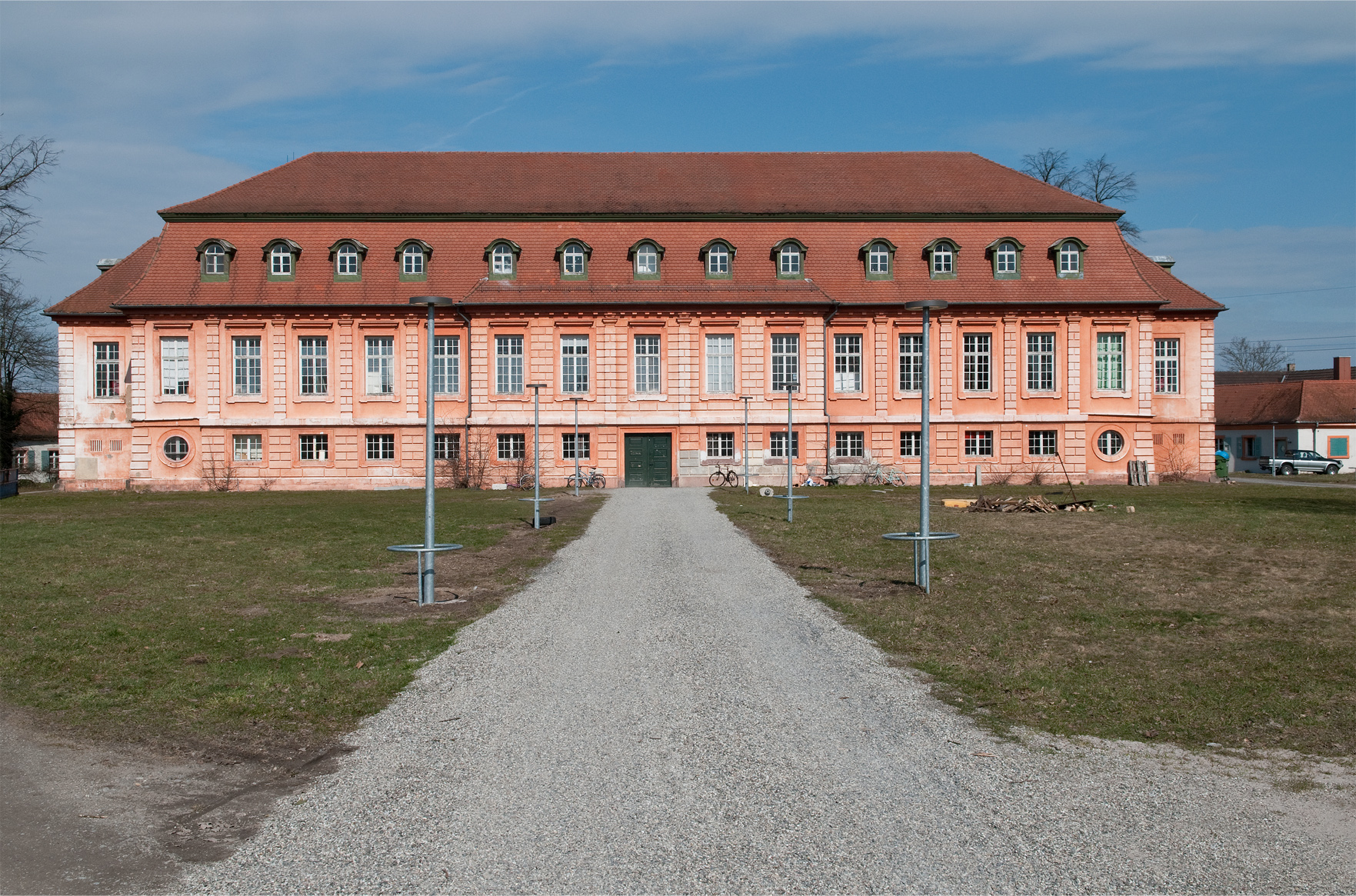 Zwei Malklassen und eine Bildhauerklasse sind in der Außenstelle der Kunstakademie Karlsruhe in Schloss Scheibenhardt untergebracht.